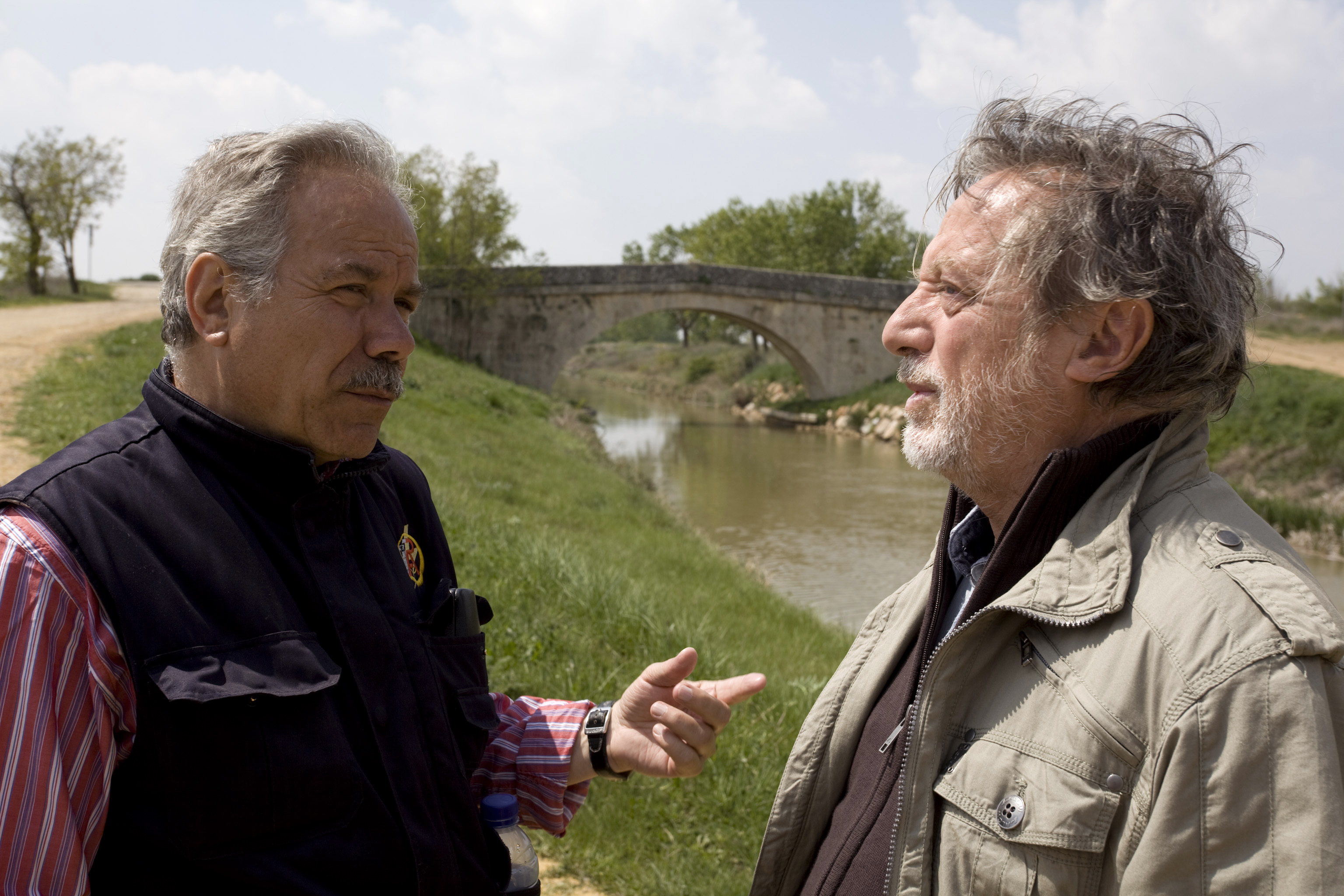 Francisco Rodríguez rodando "El Canal de Castilla" con Manuel Galiana